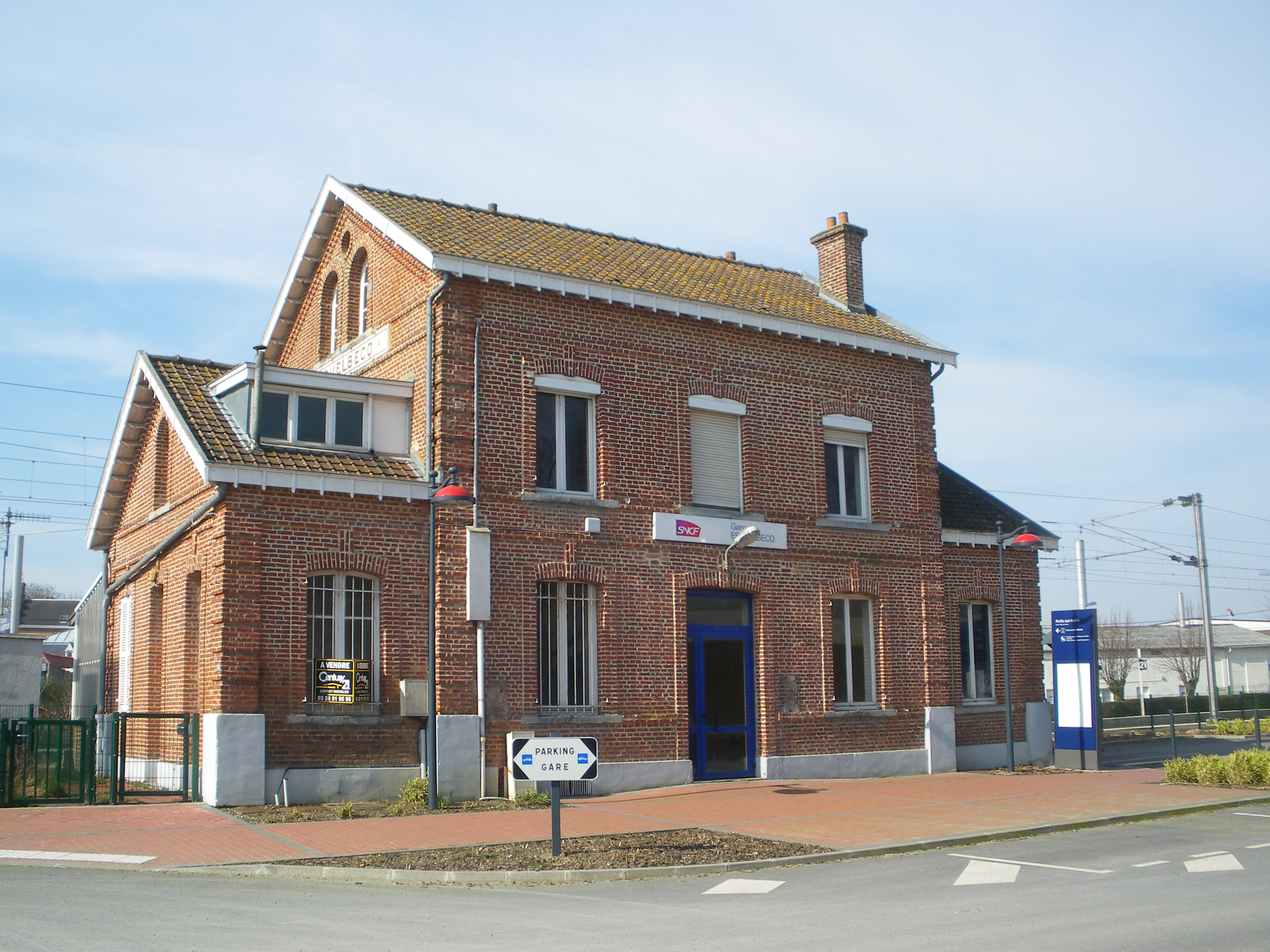 Vue du bâtiment voyageurs de la gare d'Esquelbecq.